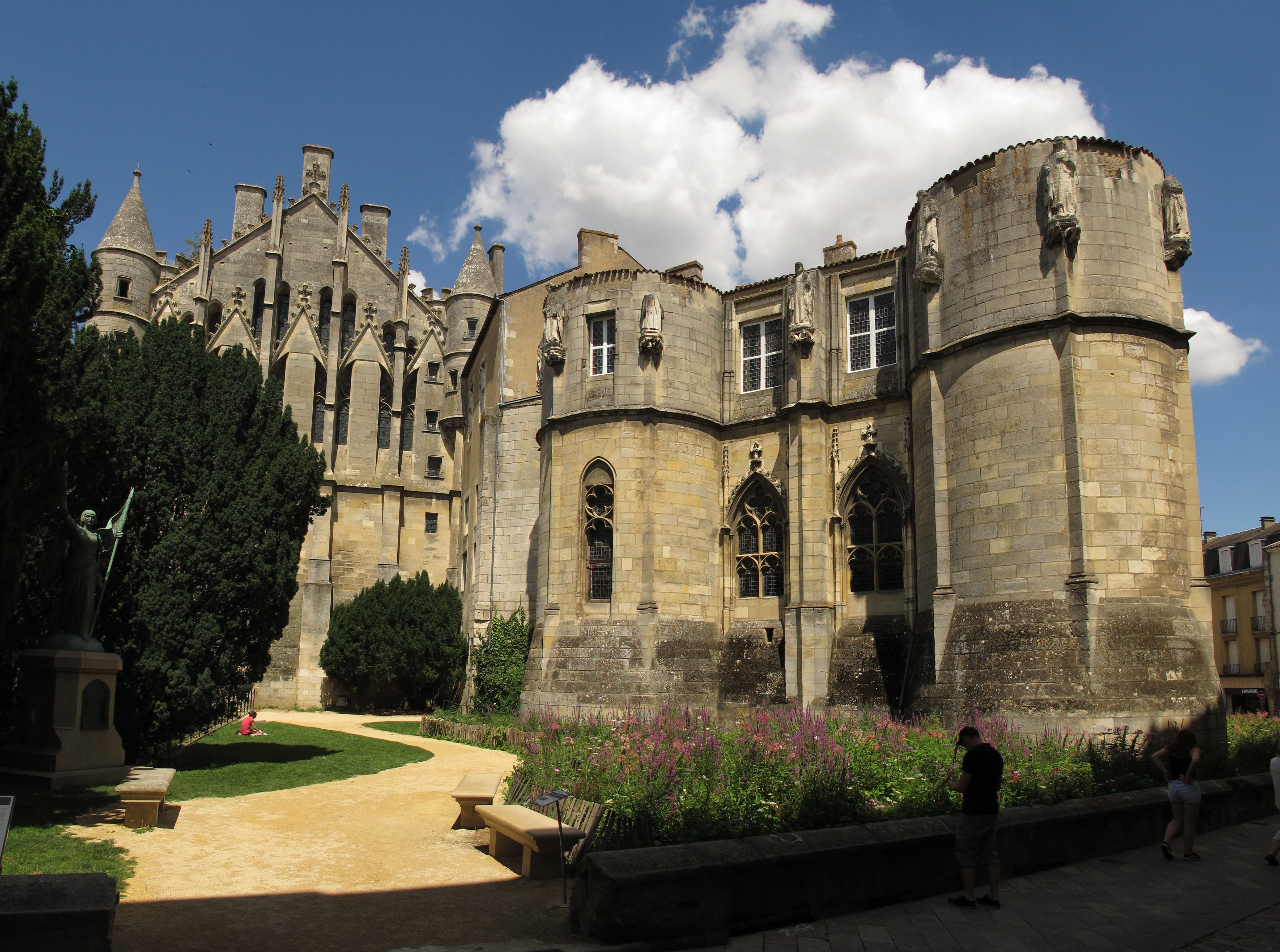 Poitiers (Frankreich): Palais des Comtes (Grafenpalast)